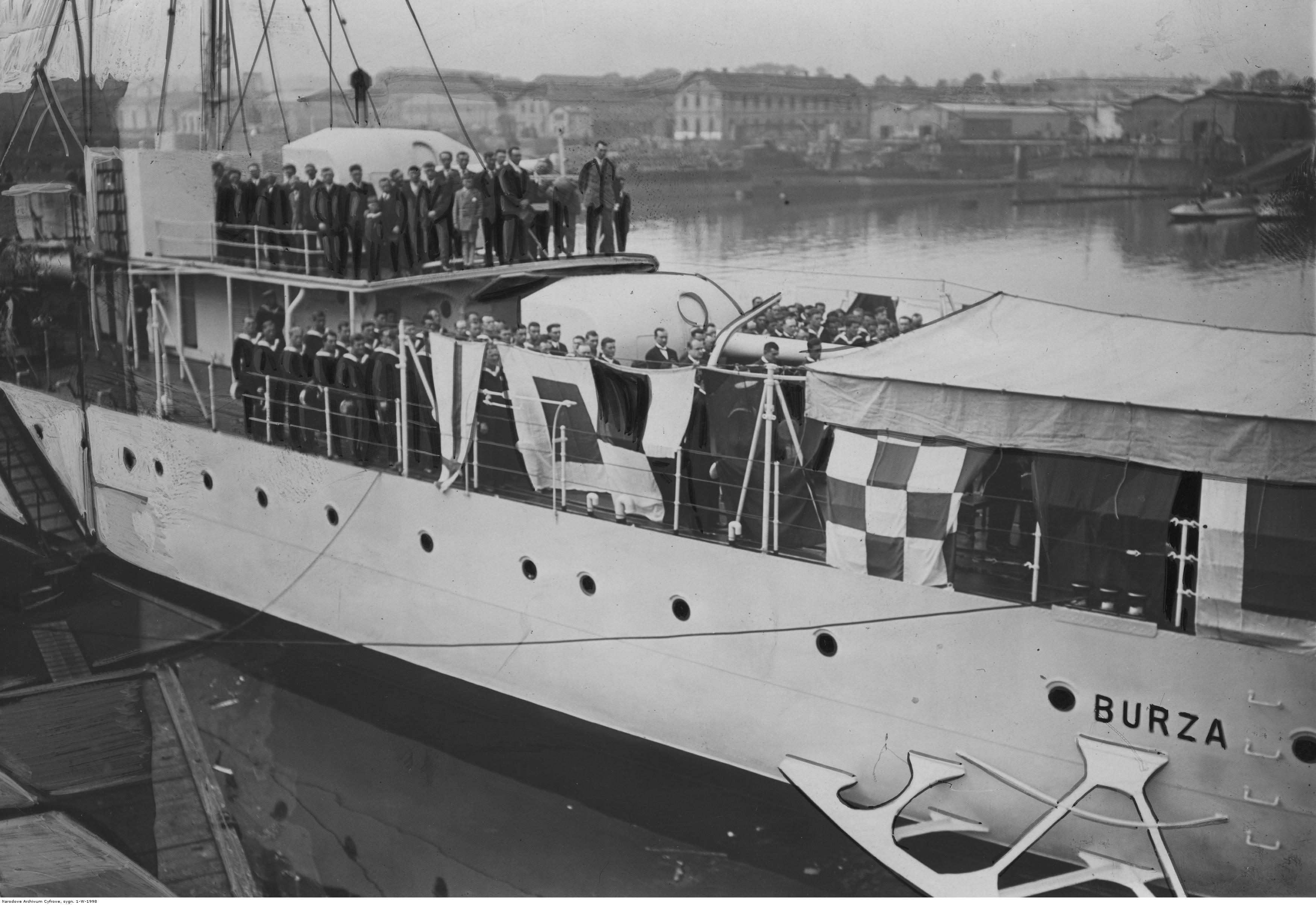 Podniesienie bandery na niszczycielu ORP "Burza" w Cherbourgu - marynarze i goście podczas mszy św. na pokładzie.